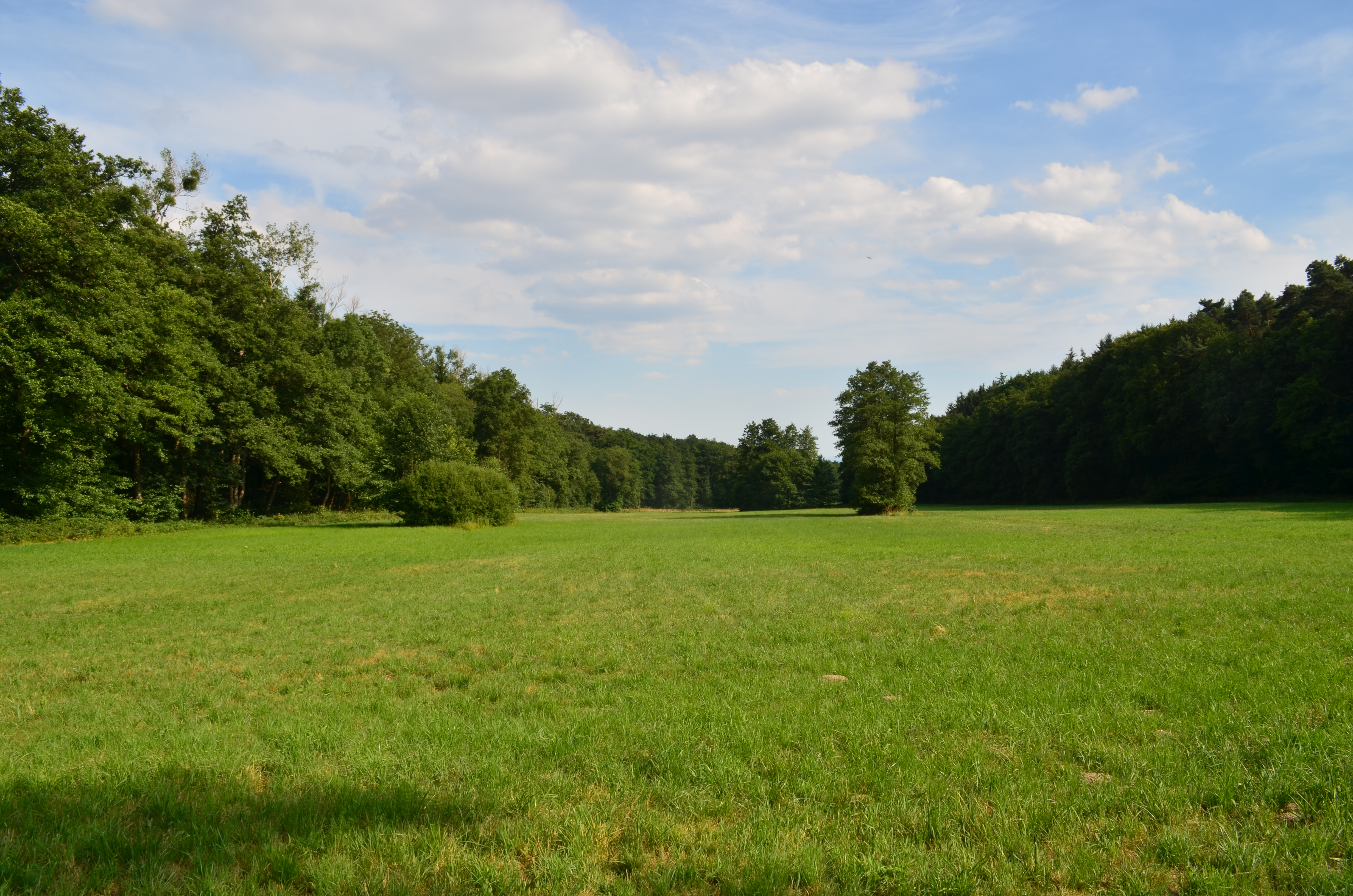 Oberhöchstadt, NSG Waldwiesental